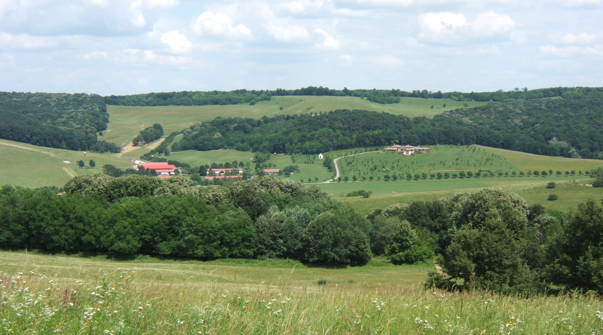 Gálosfa, Kistótváros látképe